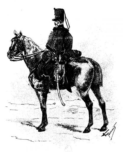 Chasseur à cheval de la Jeune Garde en grande tenue, 1815.